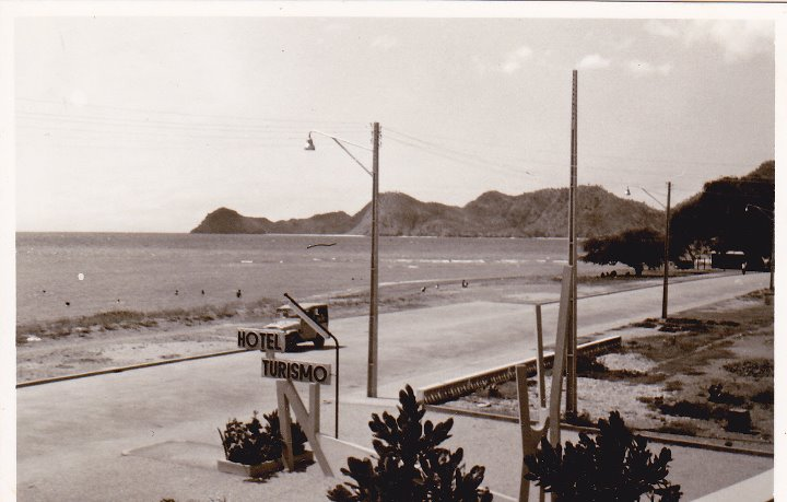 O Hotel Turismo inaugurado em 1970.Consta que foi demolido